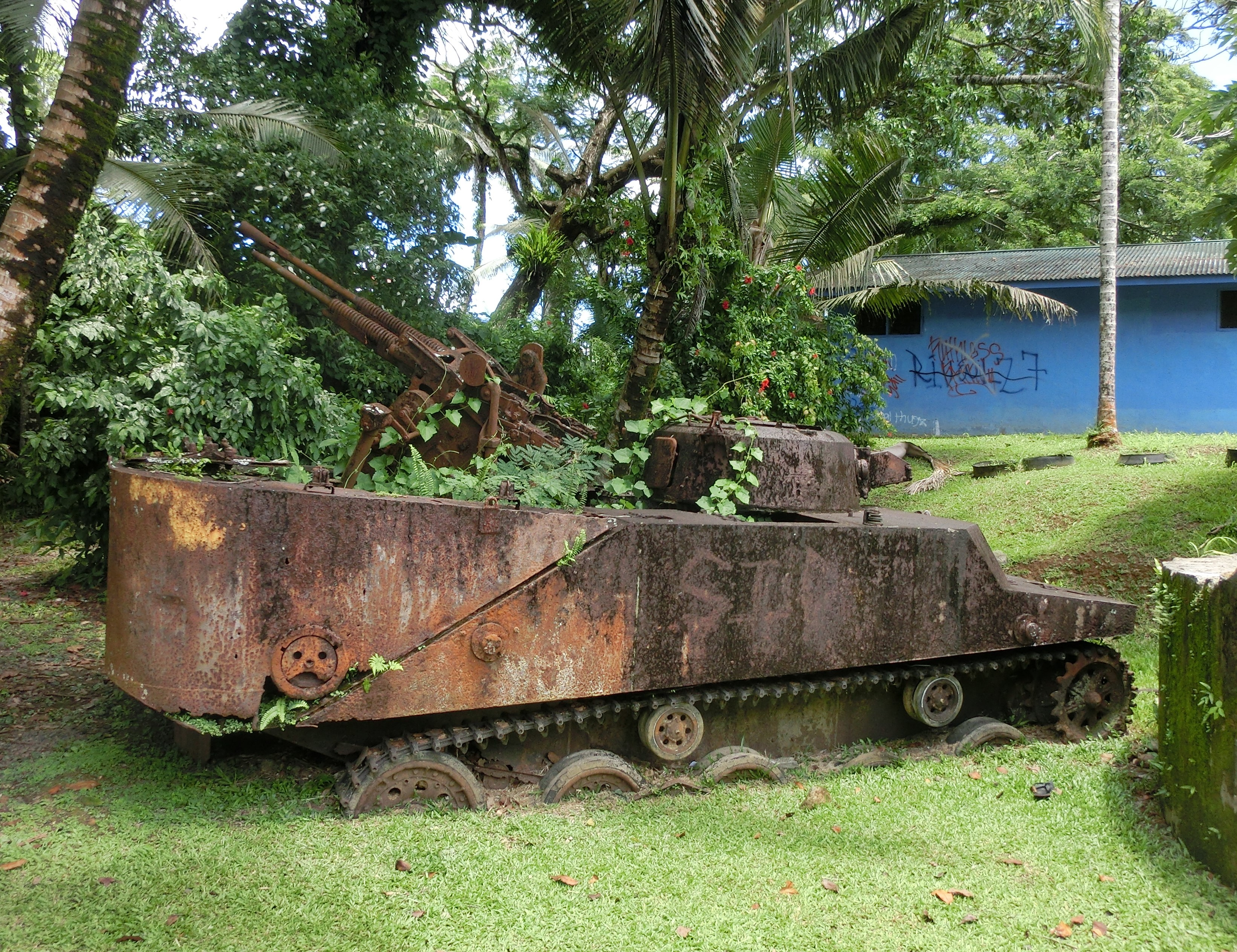 amphibious tank Type 2 Ka-Mi at Koror,Palau